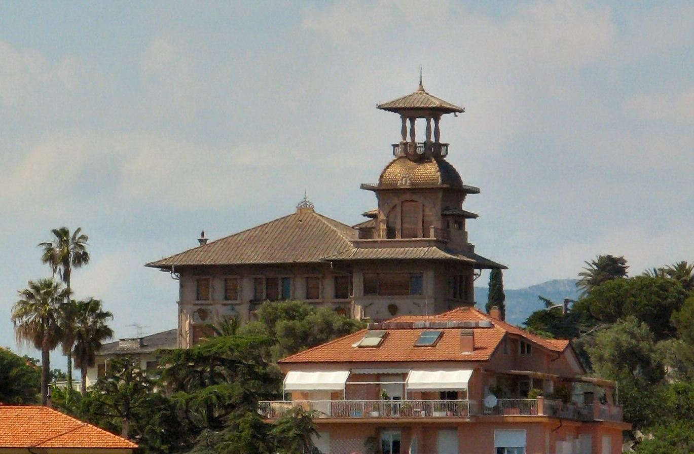 Villa Grock, Oneglia, Imperia, Italy